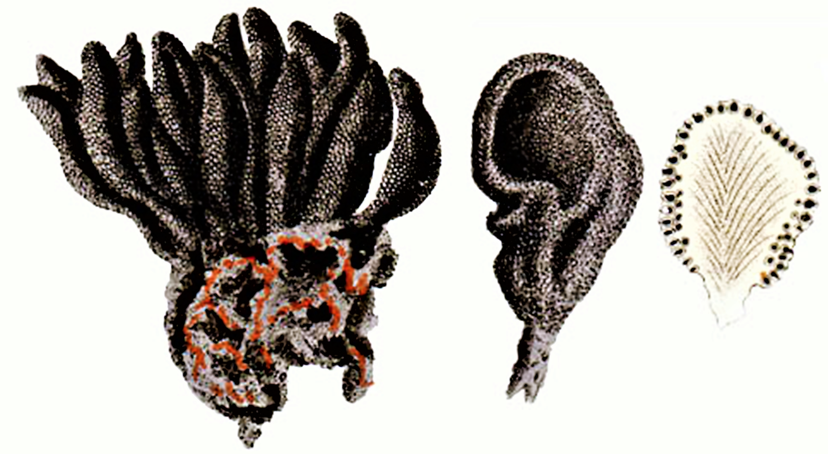 Xylaria polymorpha (Pers., 1797 ex Robert Kaye Greville, 1824)